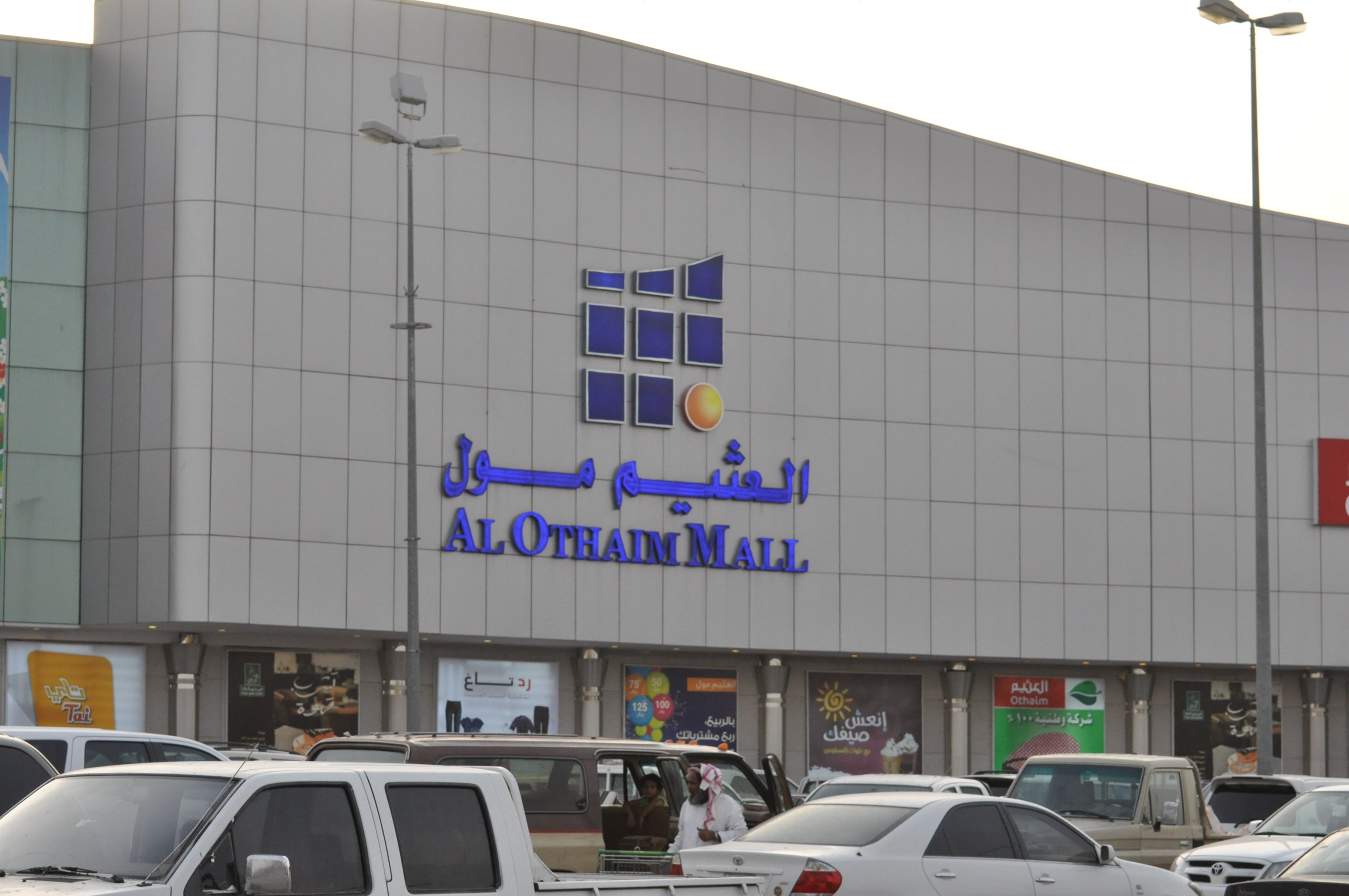 Al Othaim Mall in Buraidah